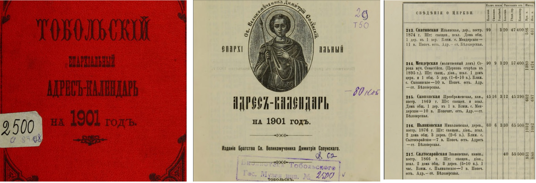 Скрин книги Братства Св. Великомученика Дмитрия Солунского